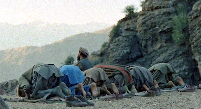 Mujahideen in Shultan Valley, Afghanistan